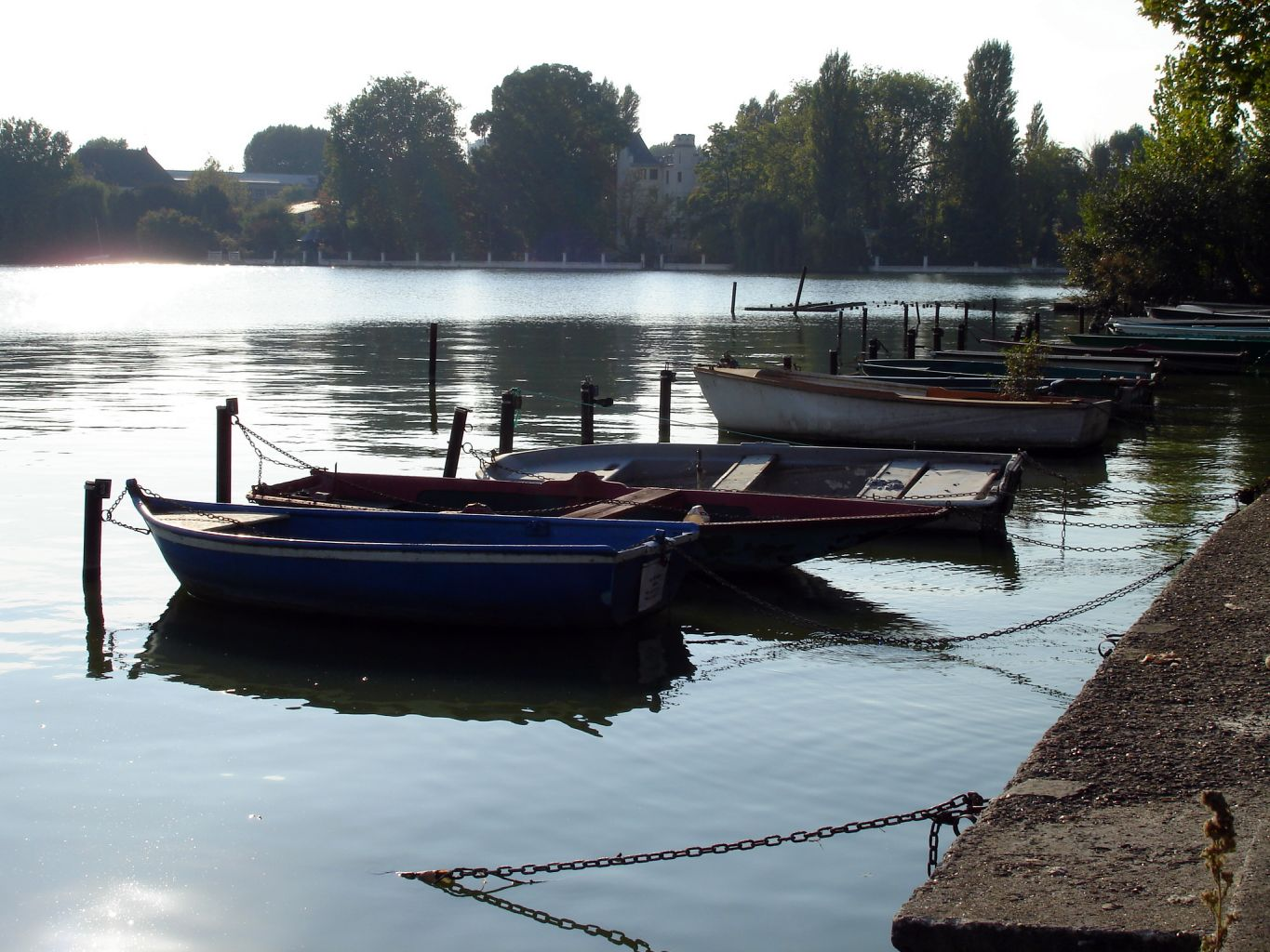 Barques à Enghien-les-Bains (France)